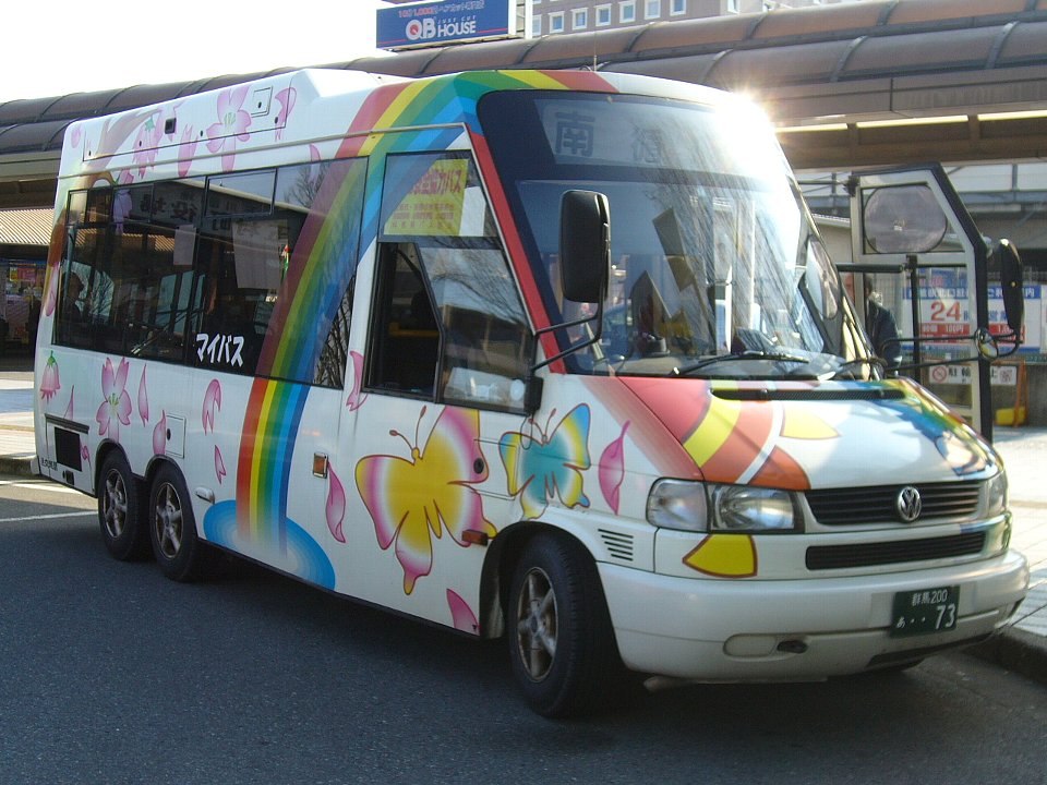 前橋コミュニティバス マイバス 南循環 前橋駅前にて